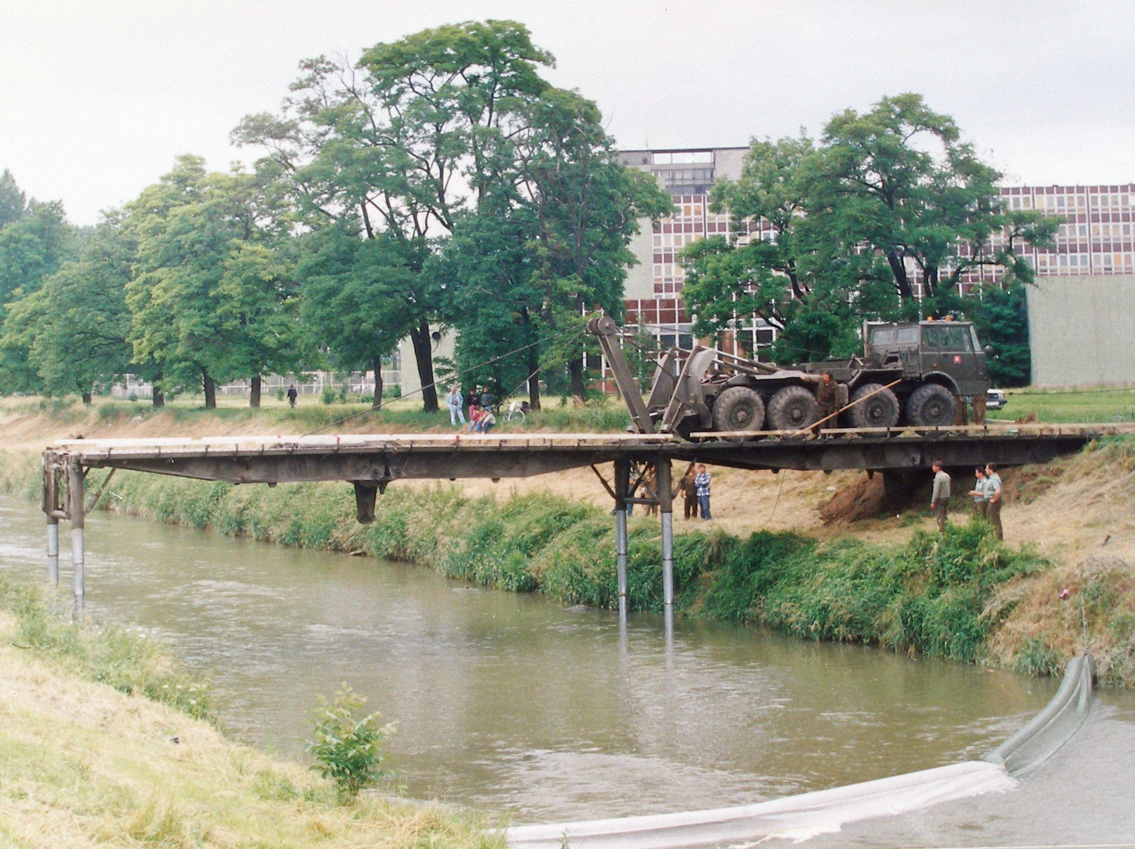 Premostenie rieky Torysy, v roku 1995 počas návštevy pápeža Jána Pavla II v Prešove pri Mestskej hale. Most postavili vojaci-ženisti, príslušníci 2. armádneho zboru.